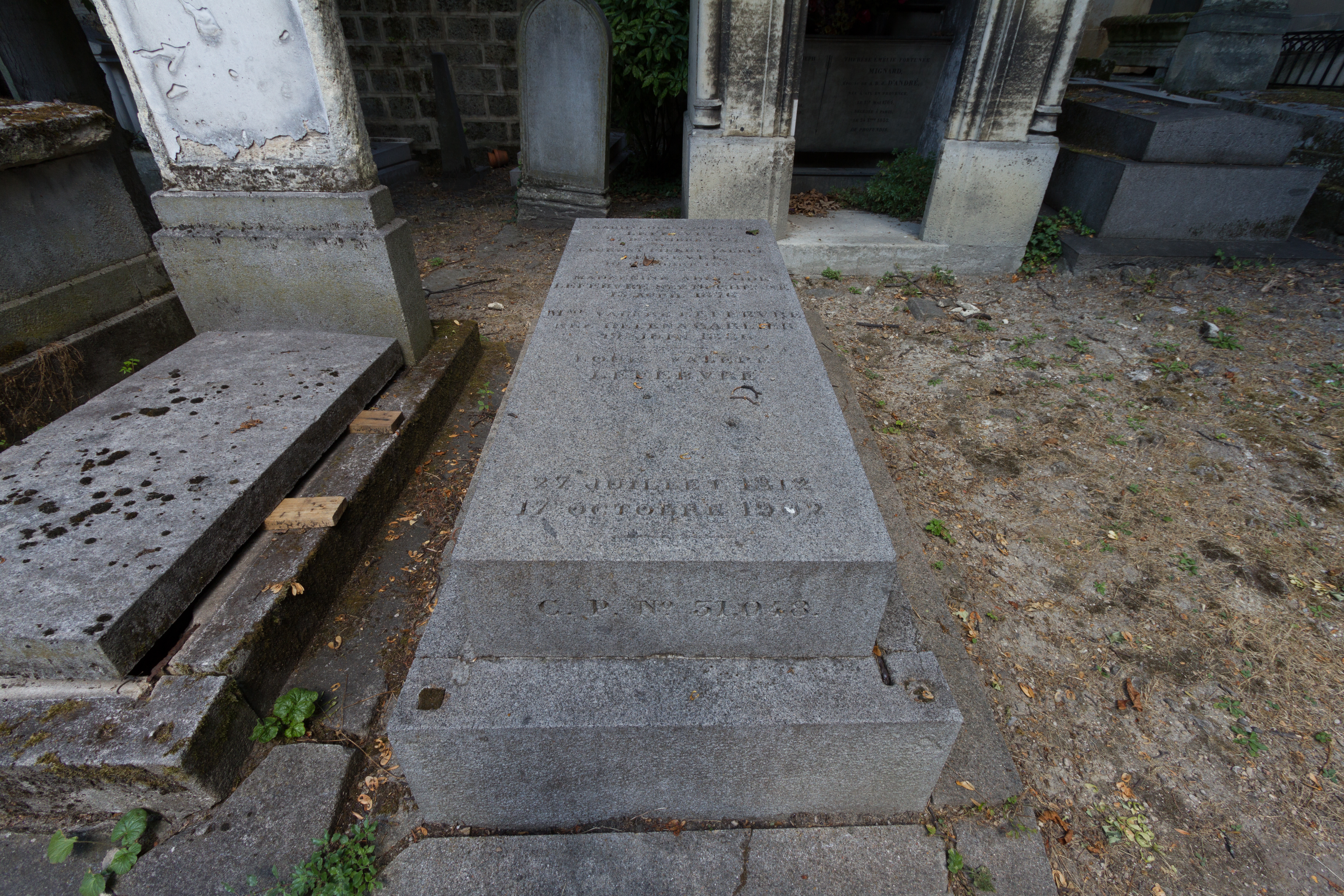 Sépulture de Louis-Valère Lefebvre (1812-1902), peintre. Son épouse et lui ont été portraituré par Henri Coroënne.